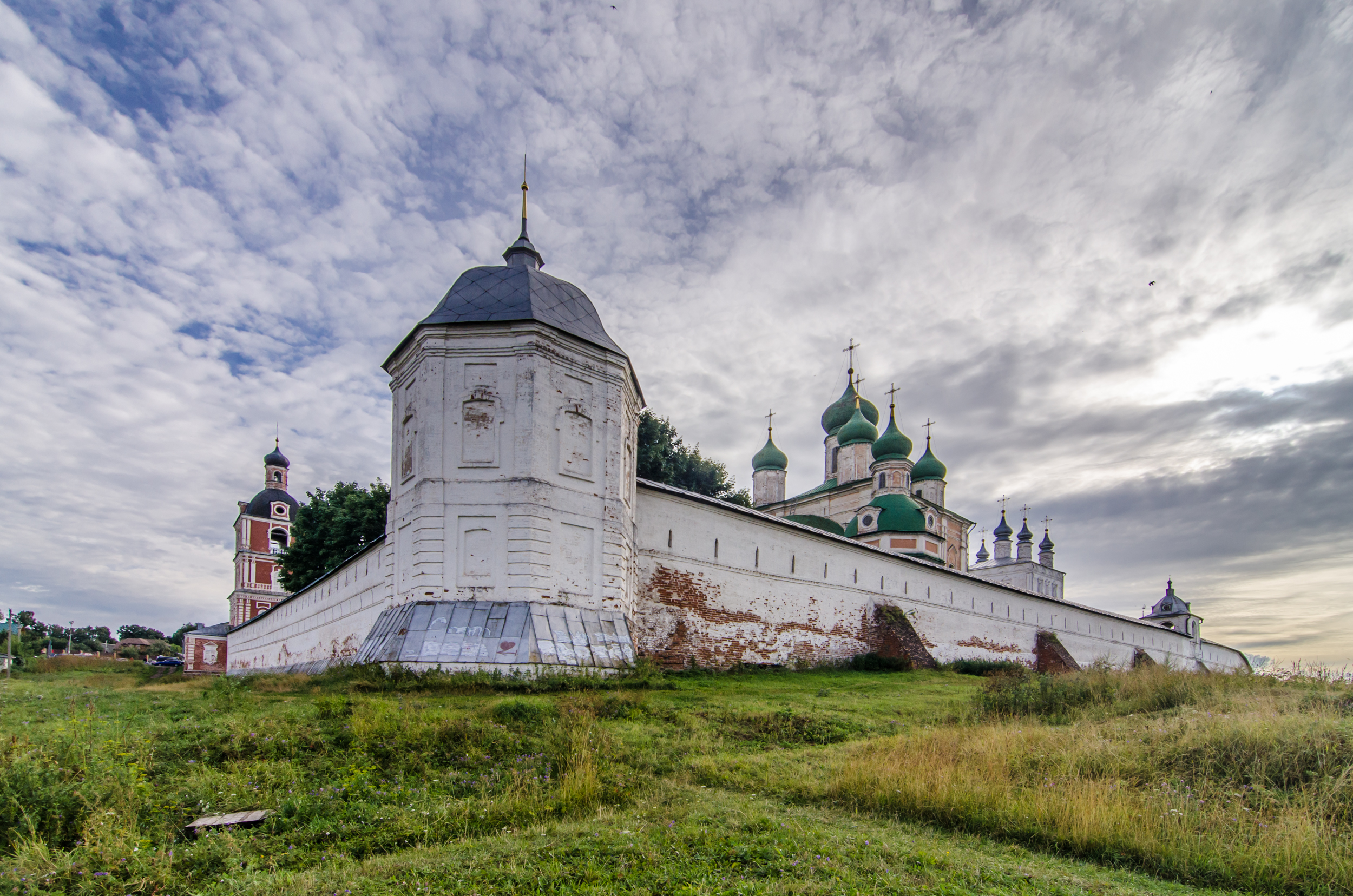 Ансамбль Успенского Горицкого монастыря: переулок Музейный, 4, Переславль-Залесский, Ярославская область